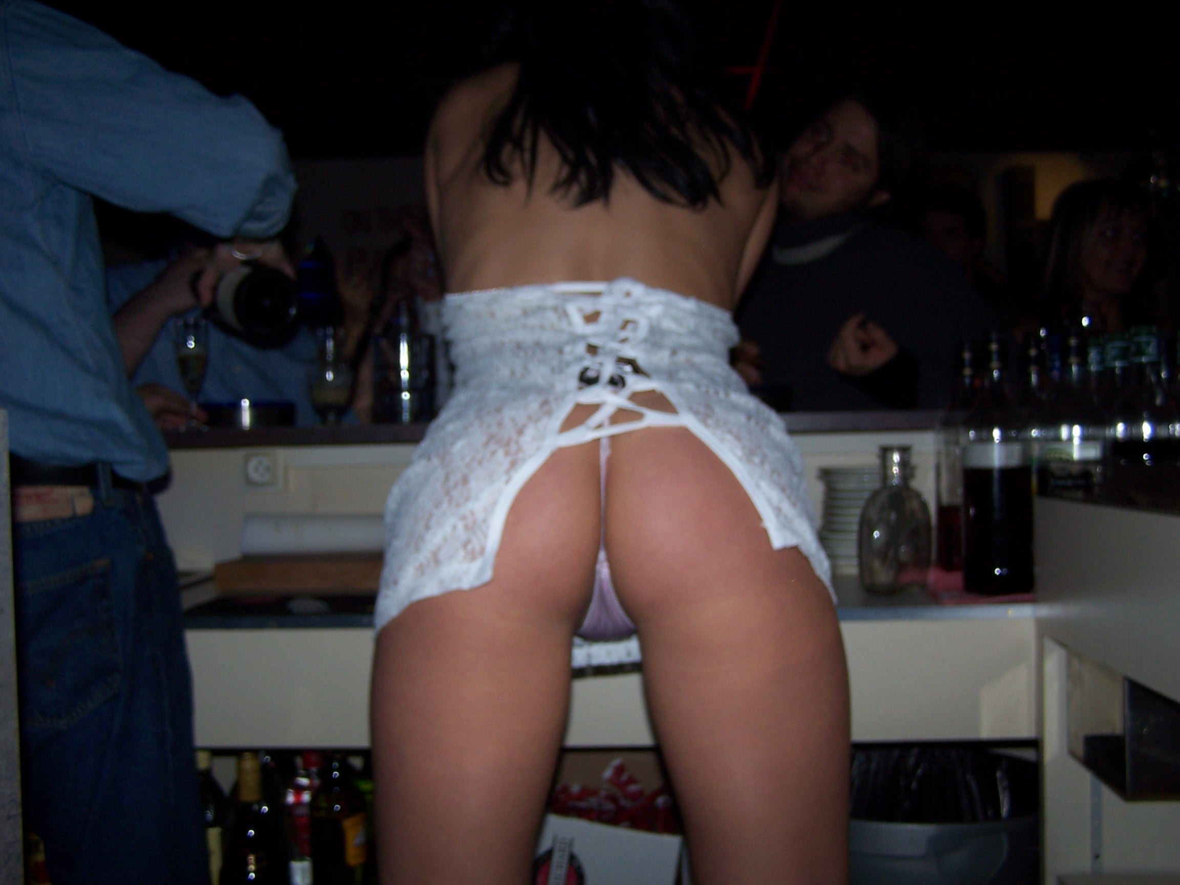 Photographie d'une jeune femme en string, vue de derrière en position cambrée. Le string est un type de sous-vêtement destiné à cacher le pubis mais laissant les fesses entièrement découvertes. Constitué de deux pièces de tissu, de cuir, de vinyle ou de latex, il est souvent réduit au strict minimum. La première pièce est un triangle recouvrant le pubis et se prolongeant en une fine bande (souvent réduite à une ficelle) passant entre les cuisses et les fesses. Elle est reliée par ses deux extrémités à la seconde pièce, elle aussi plus ou moins fine, qui entoure les hanches. Il exerce un fort pouvoir de séduction.